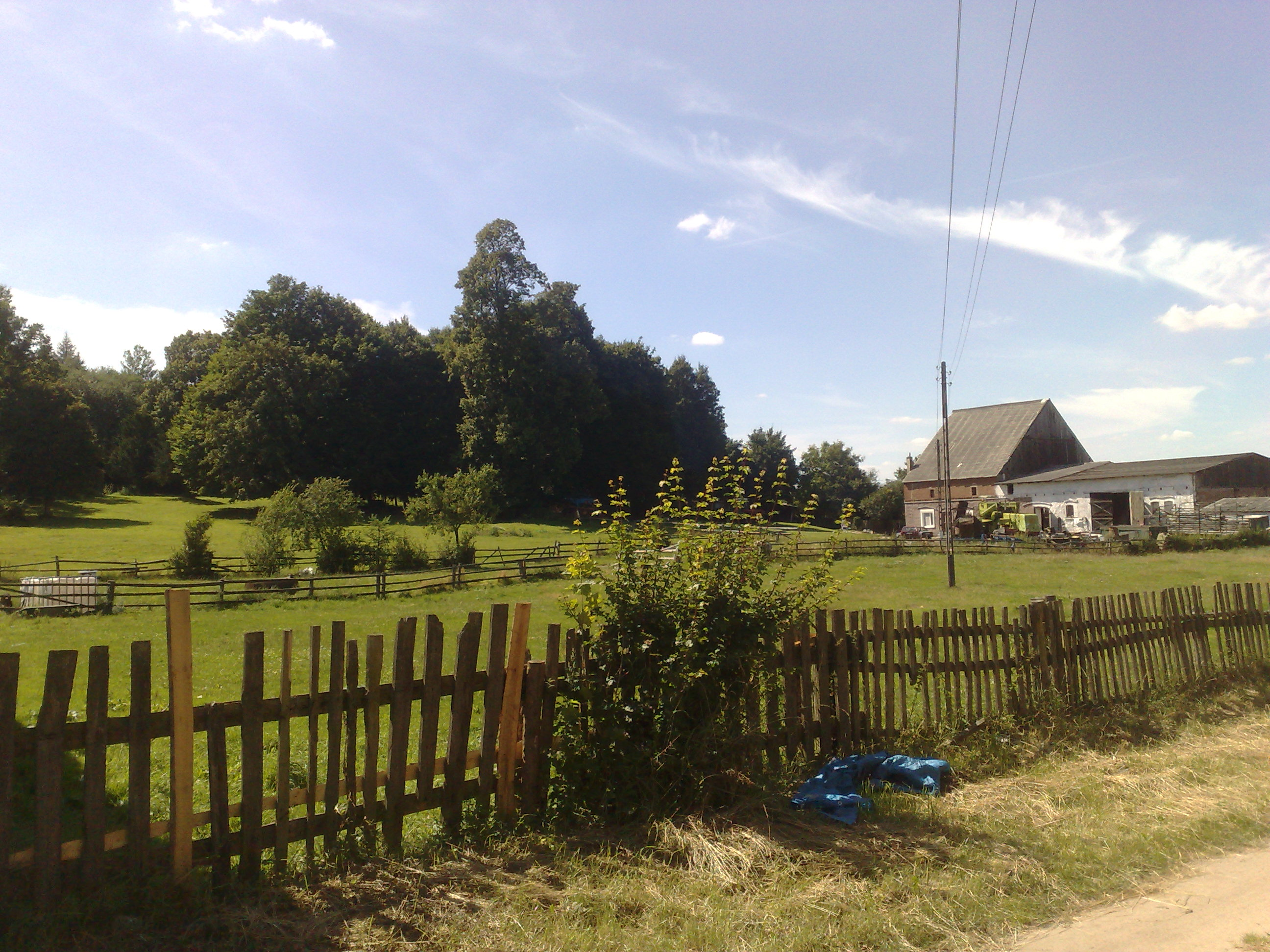 Reste des ehem. Gutshofes